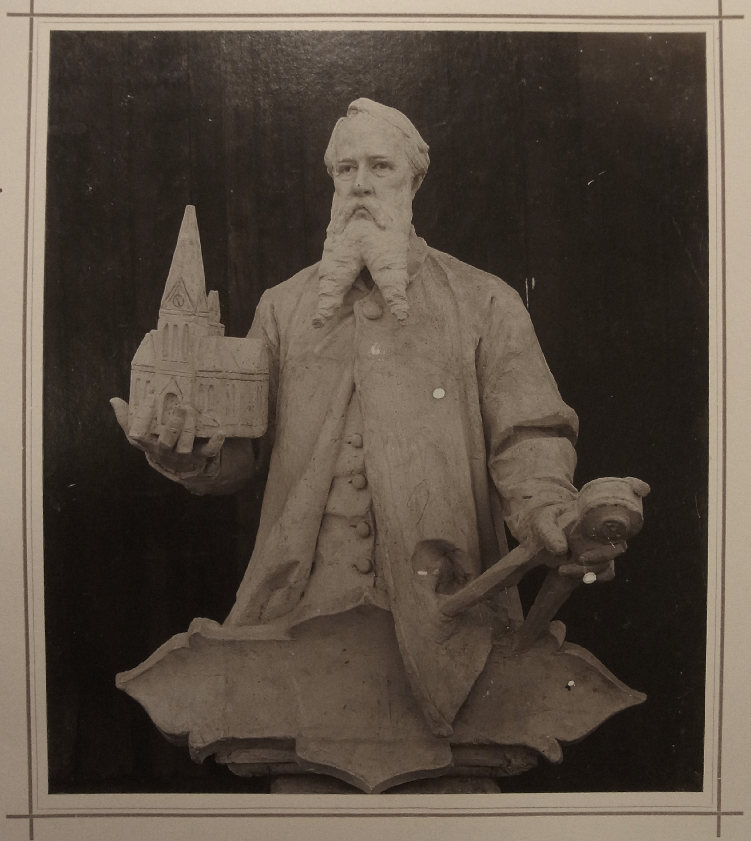 Gipsmodel für die Figur des Baumeisters Wilhelm Hauers